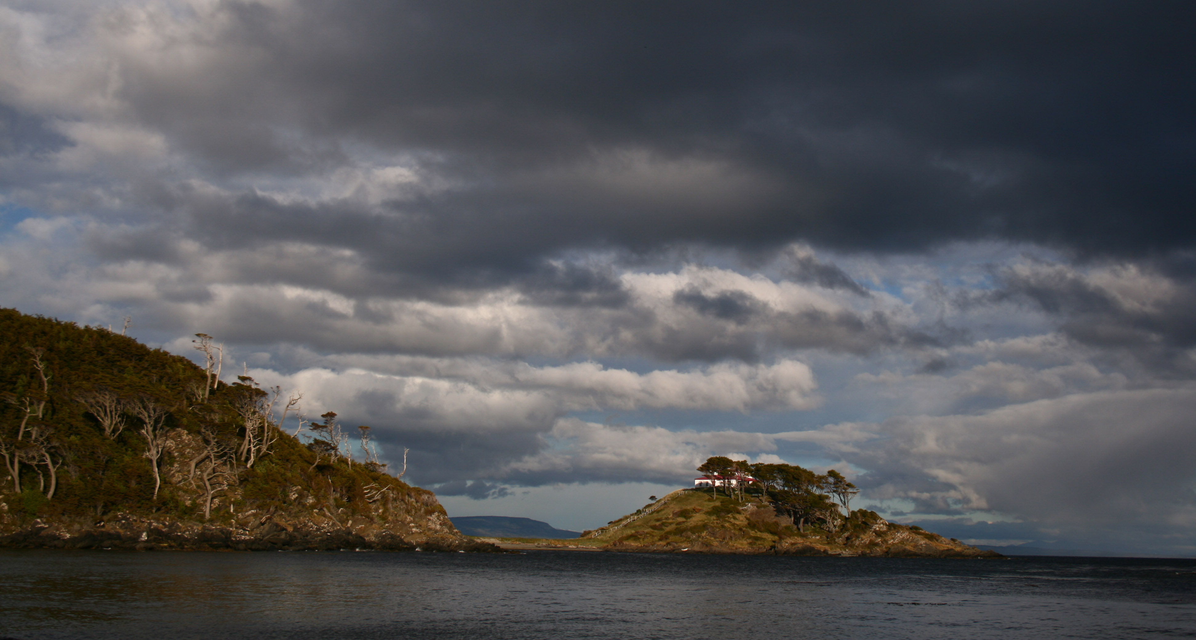 Faro San Isidro, Región de Magallanes, Chile This is a photo of a national monument in Chile: 2113